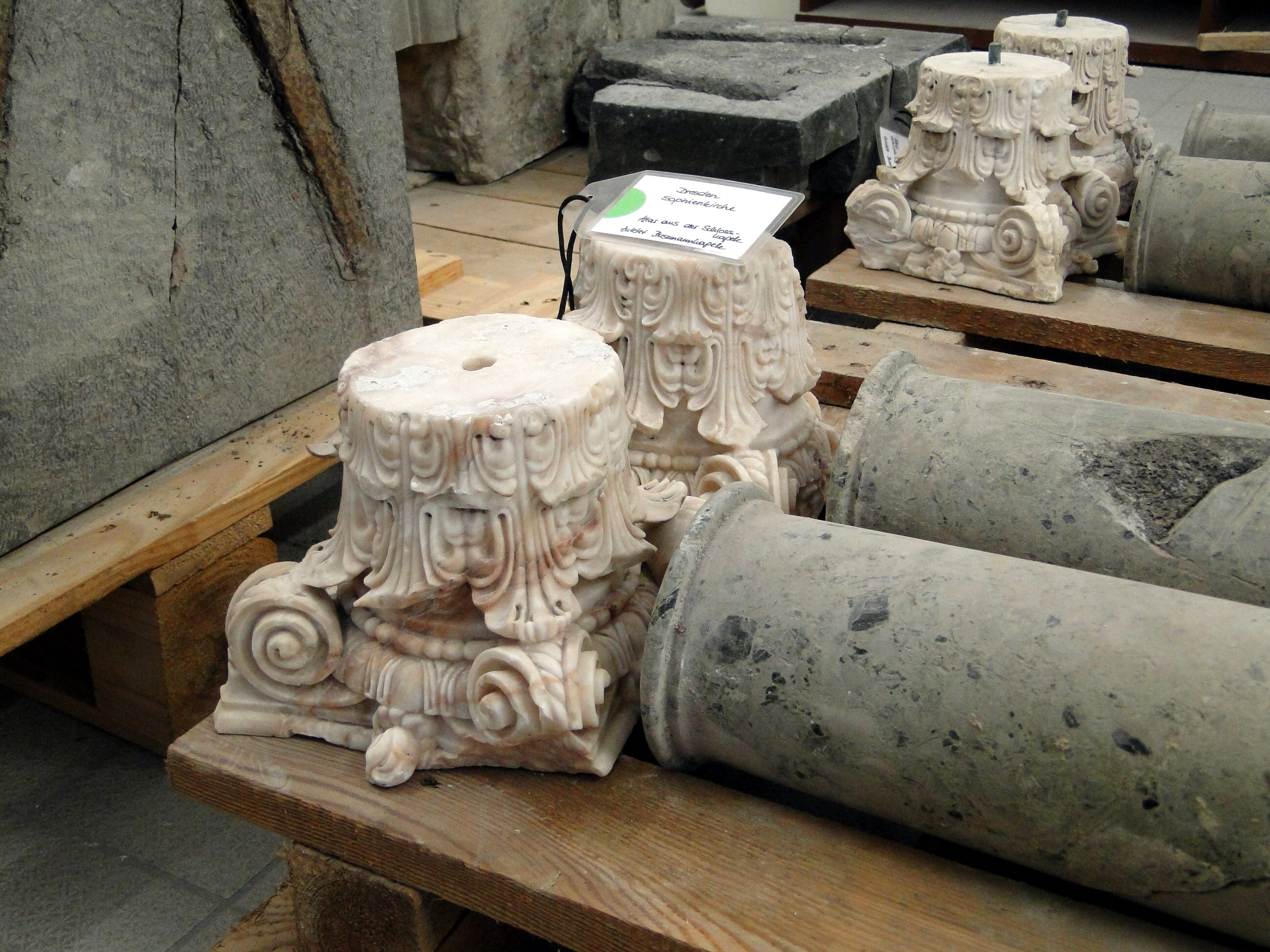 Erhaltene Teile des Altars (Säulen und Kompositkapitelle) der Schloss- und Busmannkapelle im Sächsischen Landesamt für Denkmalpflege.